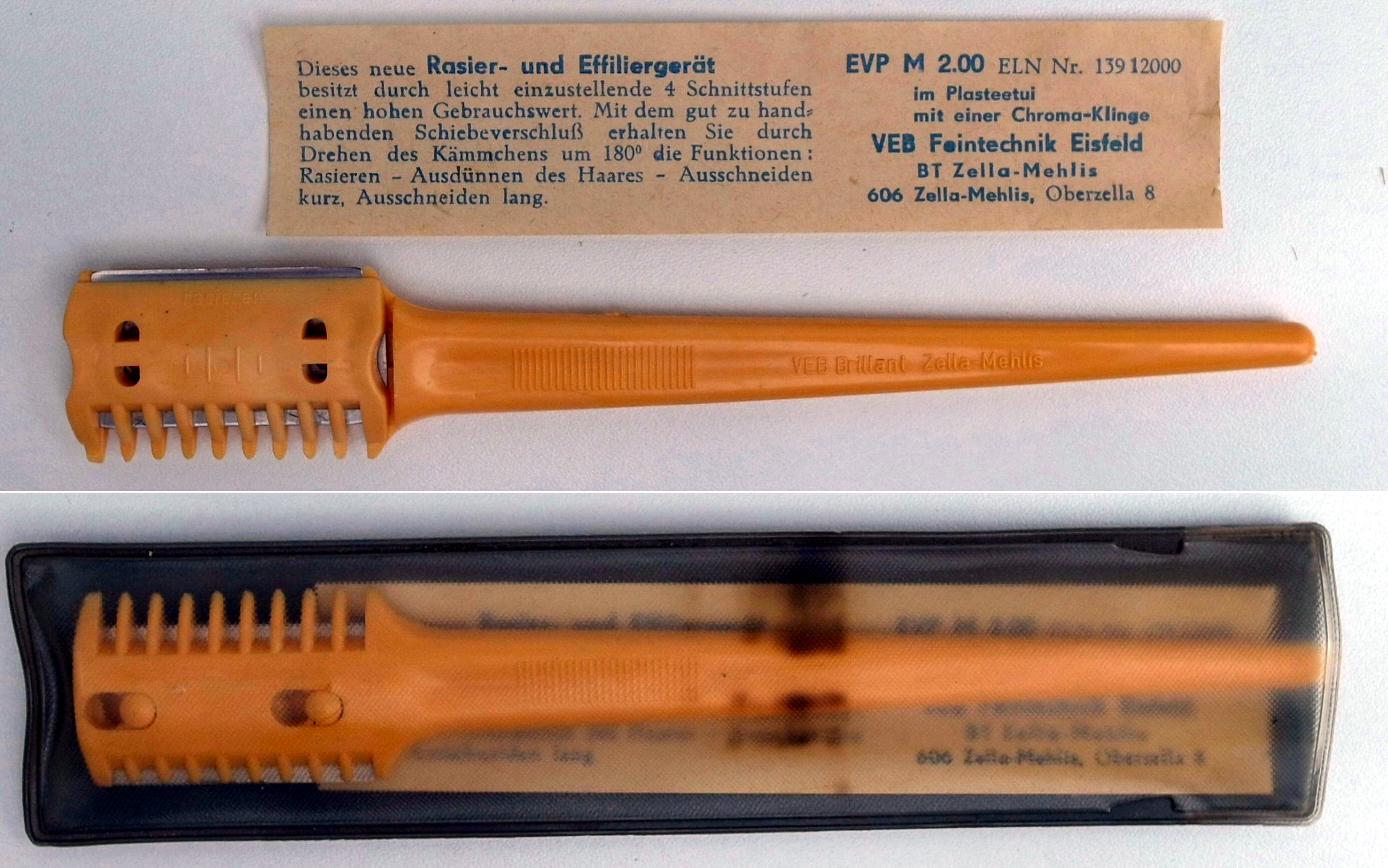 Rasier-und Effiliergerät, Länge 175 mm. VEB Feintechnik Eisfeld, DDR.